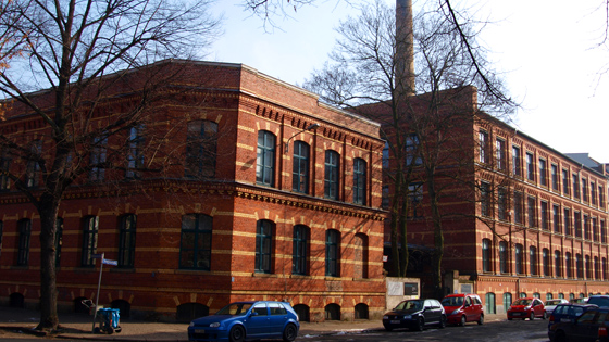 Firmengebäude der Oemus Media AG